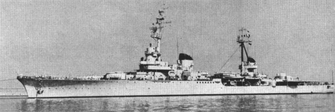 The Italian Condottieri-class light cruiser Raimondo Montecuccoli (C552) at anchor, circa 1962.